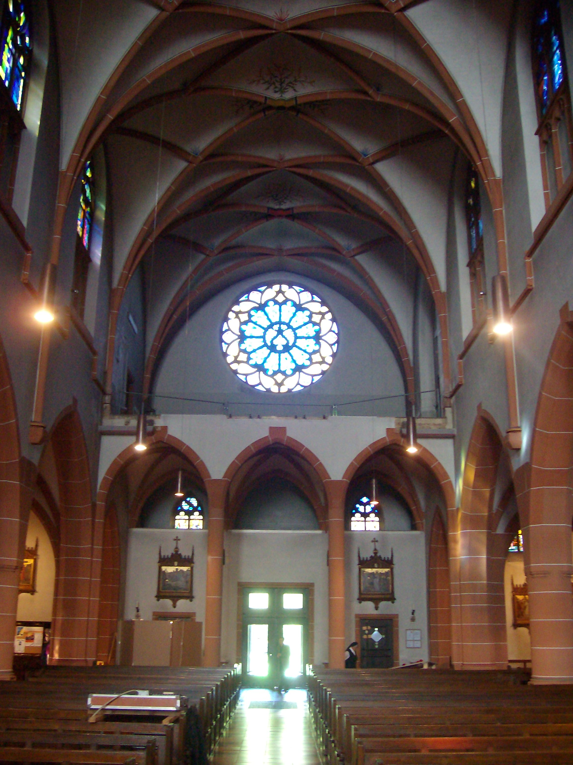 Innenraum von St. Bonifatius, Gießen, Hessen